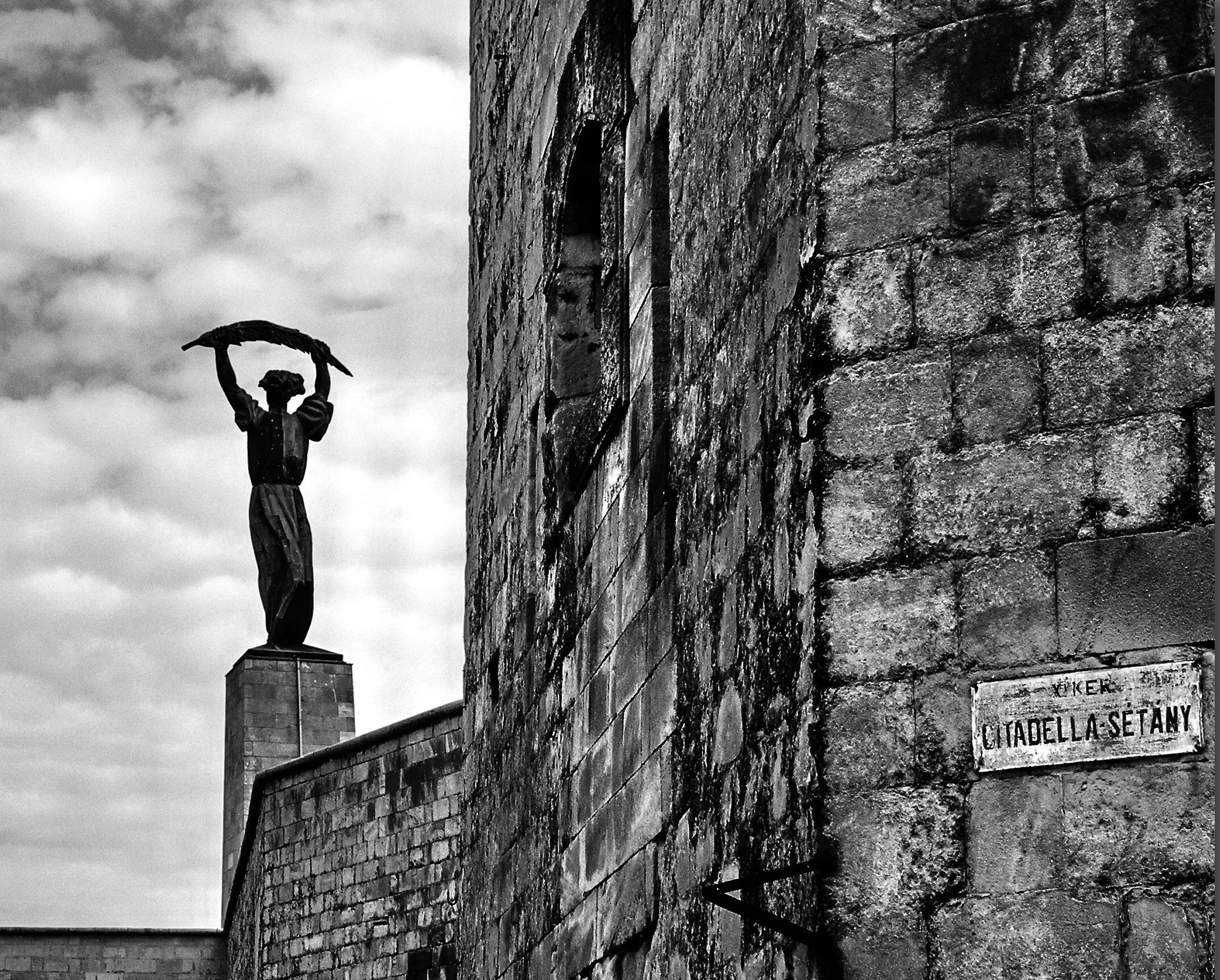 Citadella This is a photo of a monument in Hungary. Identifier: 1119